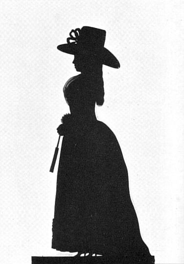 Herzogin Luise von Sachsen-Weimar Die für das letzte Viertel des 18.Jahrhunderts charakteristische Form des Porträts ist die des Schattenrisses, die in den achtziger Jahren ihre Blüte erreichte. Der Hauptsilhoutteur des Weimarer Kreises war wohl Starke, dem auch die Reihe der hier wiedergegebenen ganzfigurigen Schnitte zuverdanken ist. Die Persönlichkeiten sind schon früher genannt. Sämtliche Schattenrisse waren 1932 im Besitz der Sammlung Kippenberg, mit Ausnahme der Frau von Stein und Knebel, die 1932 im Besitz des Goethe Nationalmuseums in Weimar waren.